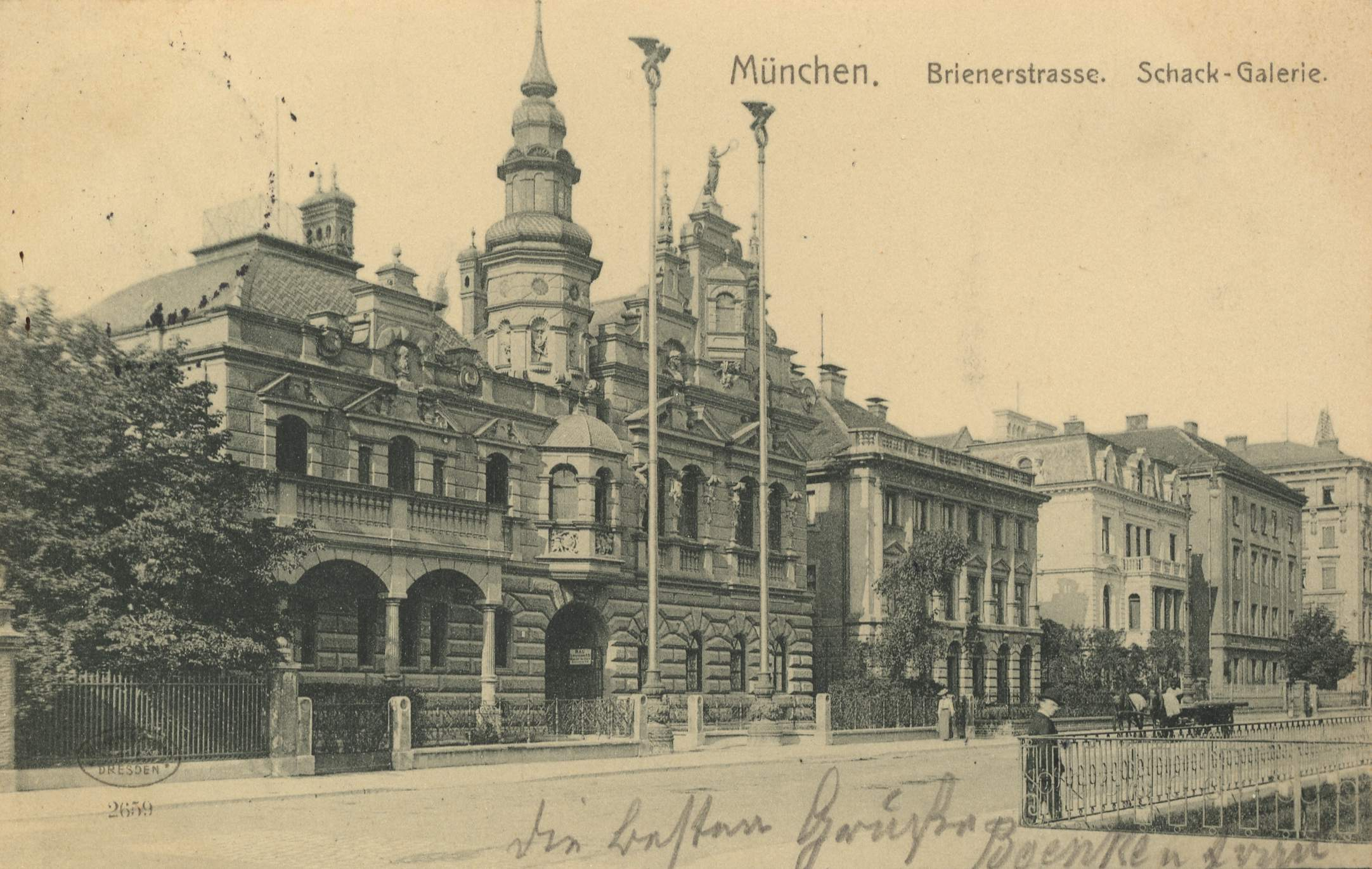 Brienerstraße, Schack-Galerie